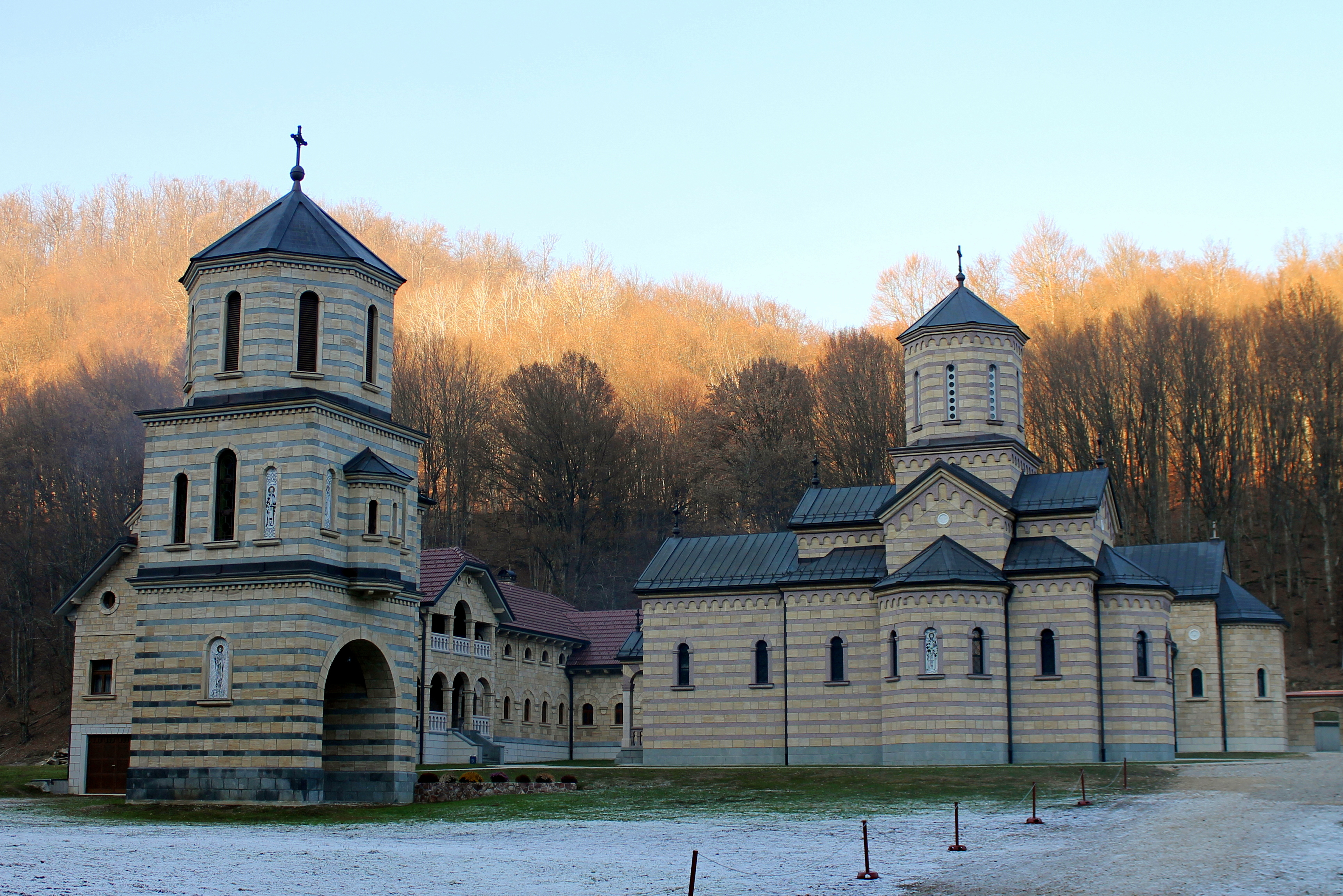 Obnovljeni manastir Osovica This image was uploaded as part of Trace of Soul 2018.